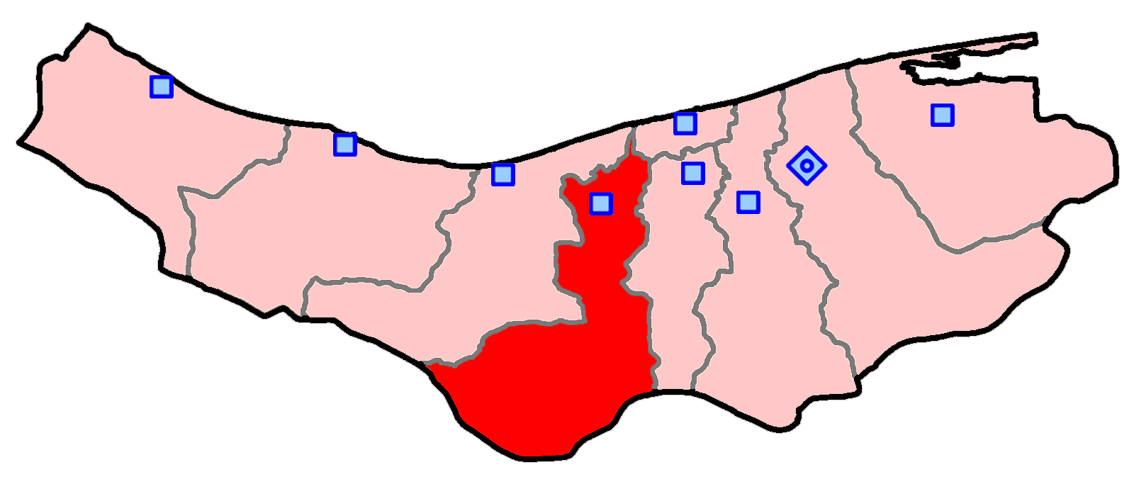 حوزهٔ انتخاباتی آمل برای انتخابات مجلس شورای اسلامی